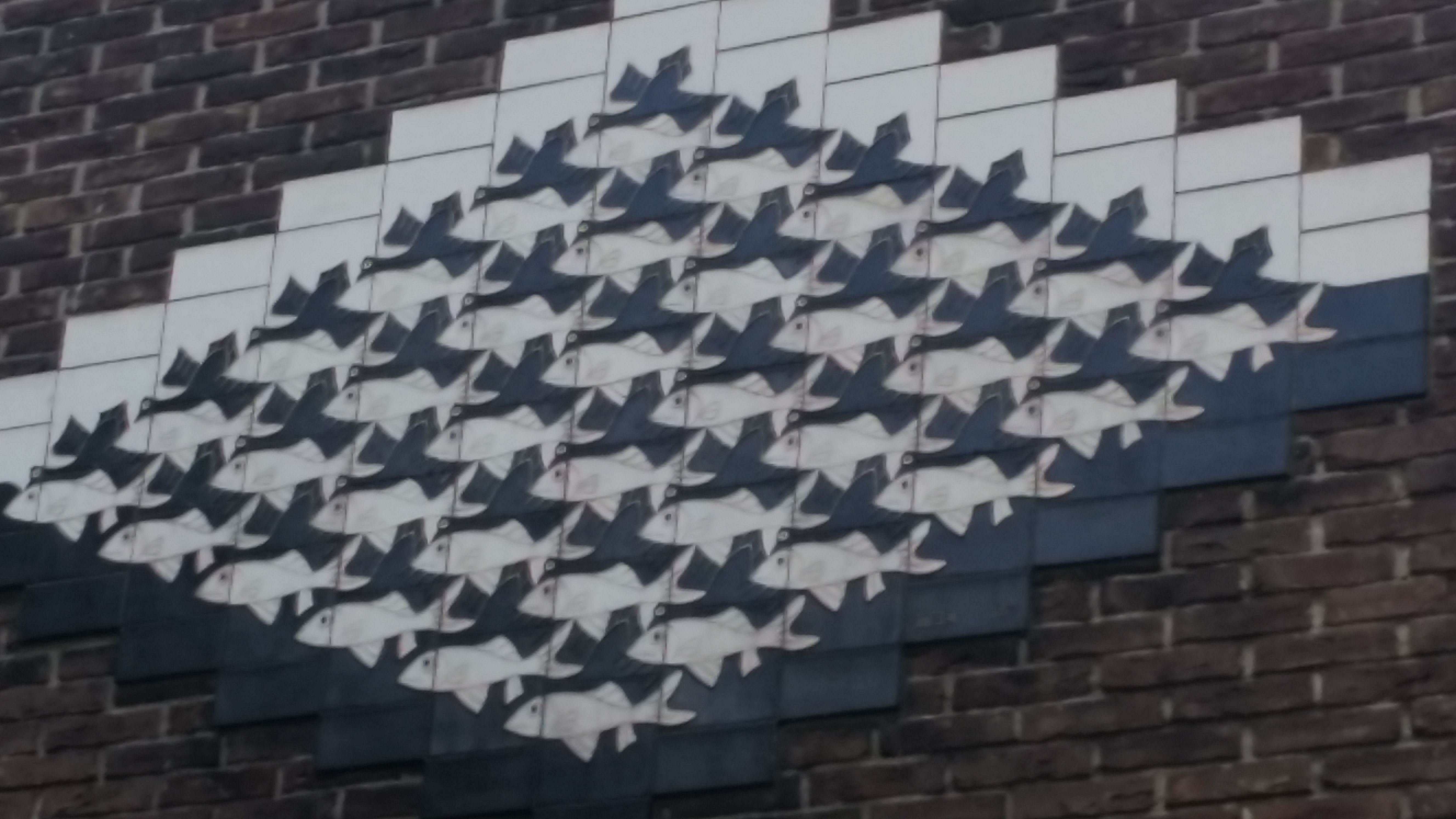 Vogels en vissen van M.C. Escher aan de gevel van Dirk Schäferstraat 59, Amsterdam. M.C. Escher’s tableau “Vogels en Vissen” © The M.C. Escher Company, Baarn. Alle rechten voorbehouden.